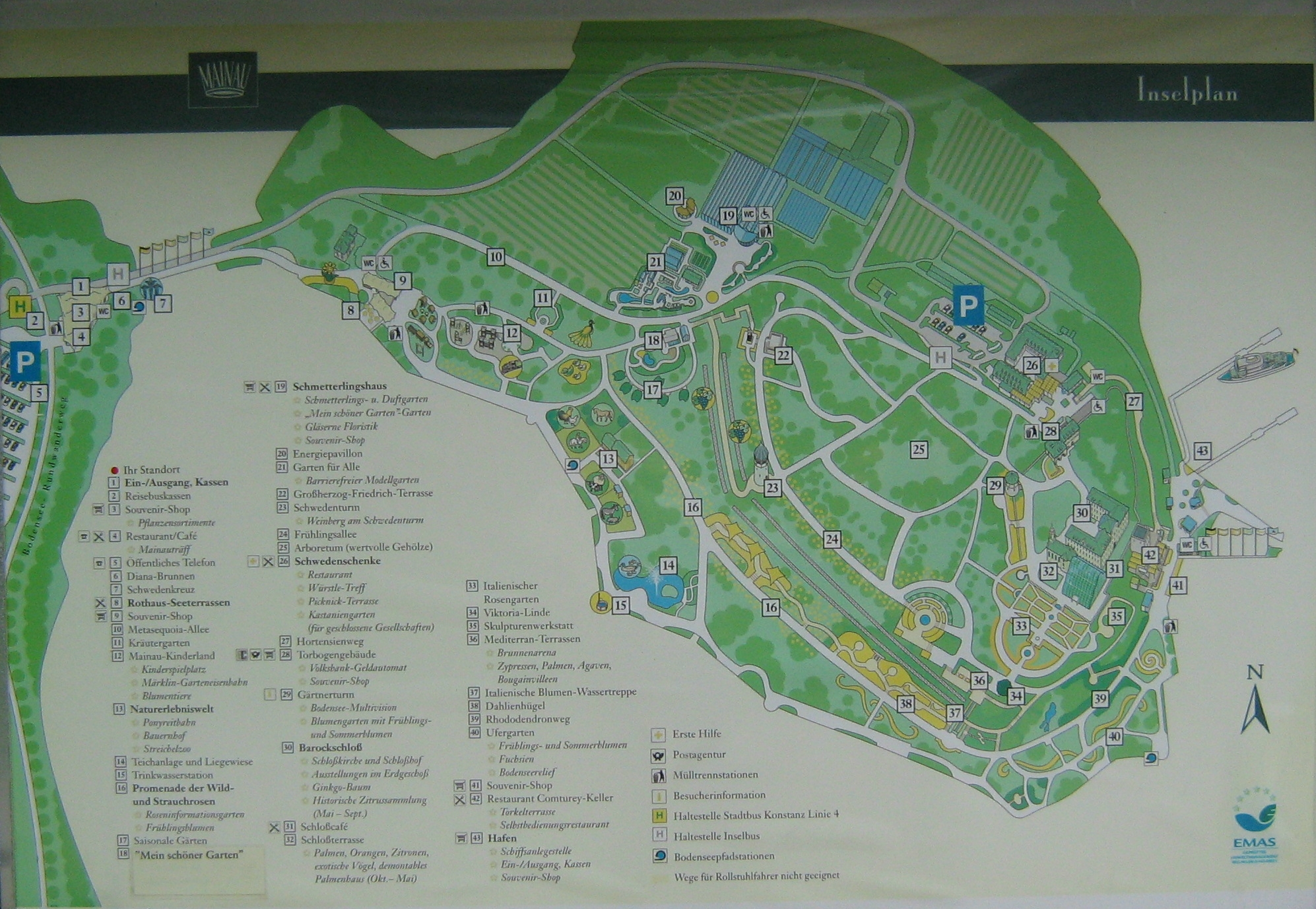 Plan von der Bodensee - Insel Mainau